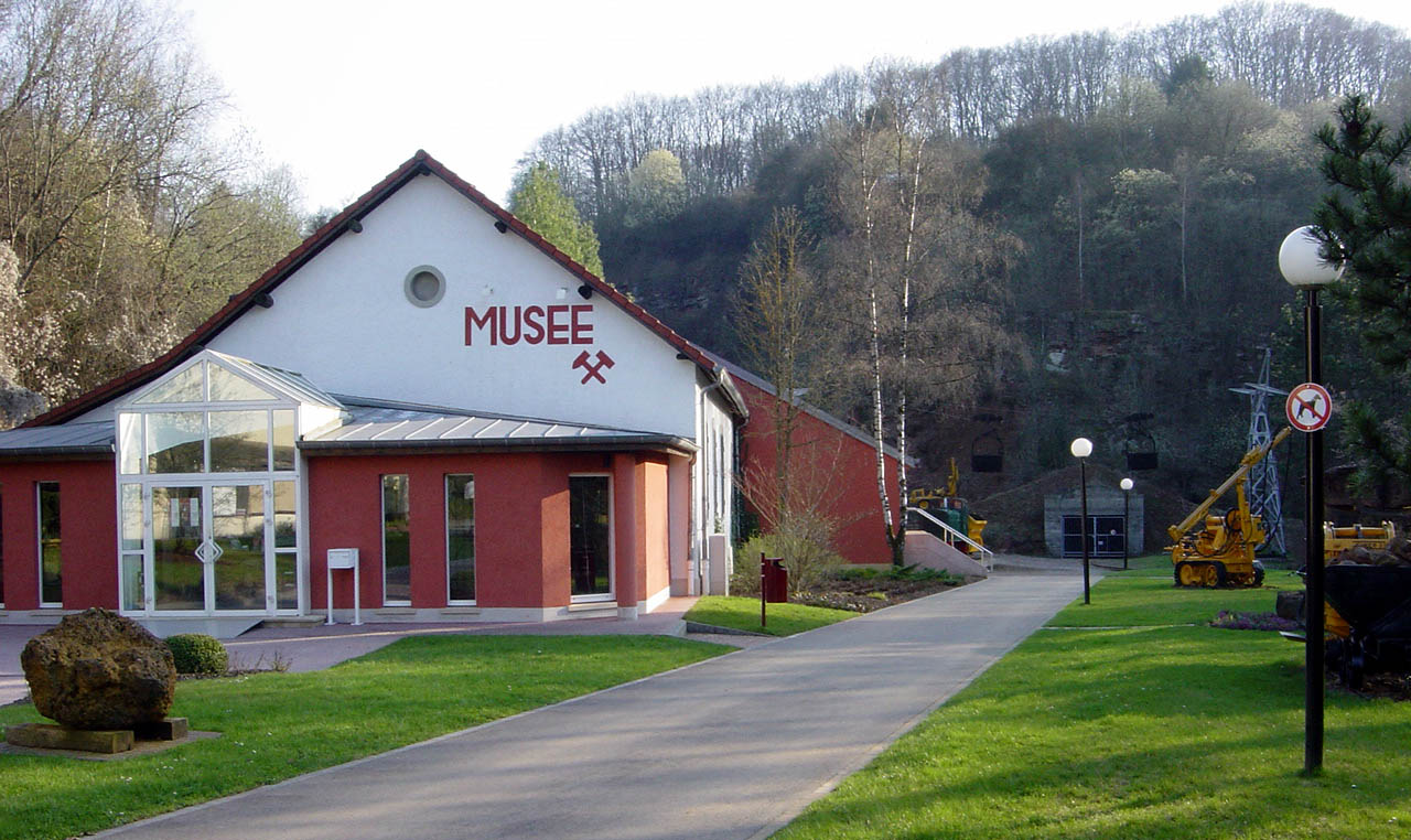 Musée National des Mines zu Rëmeleng